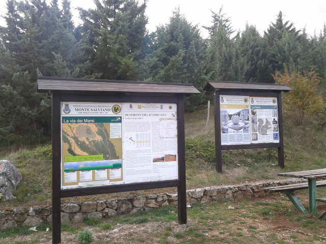 Cartelloni all'ingresso della via dei Marsi